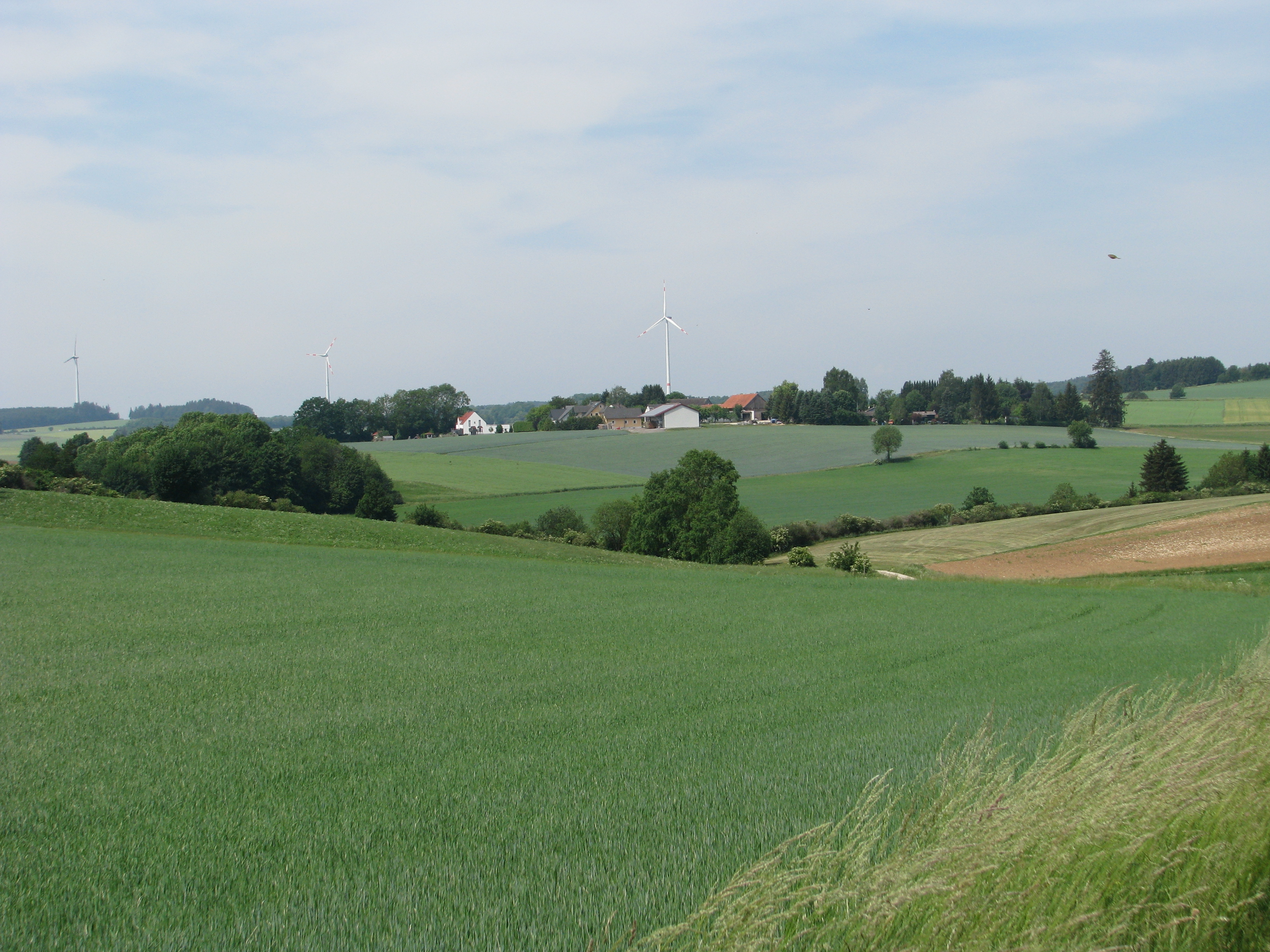 Giggling, Ortsteil der Gemeinde Pilsach im Landkreis Neumarkt i. d. Opf.